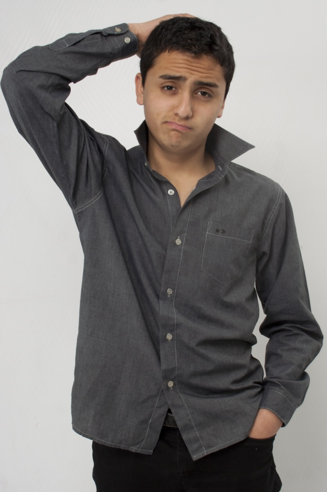 Felipe